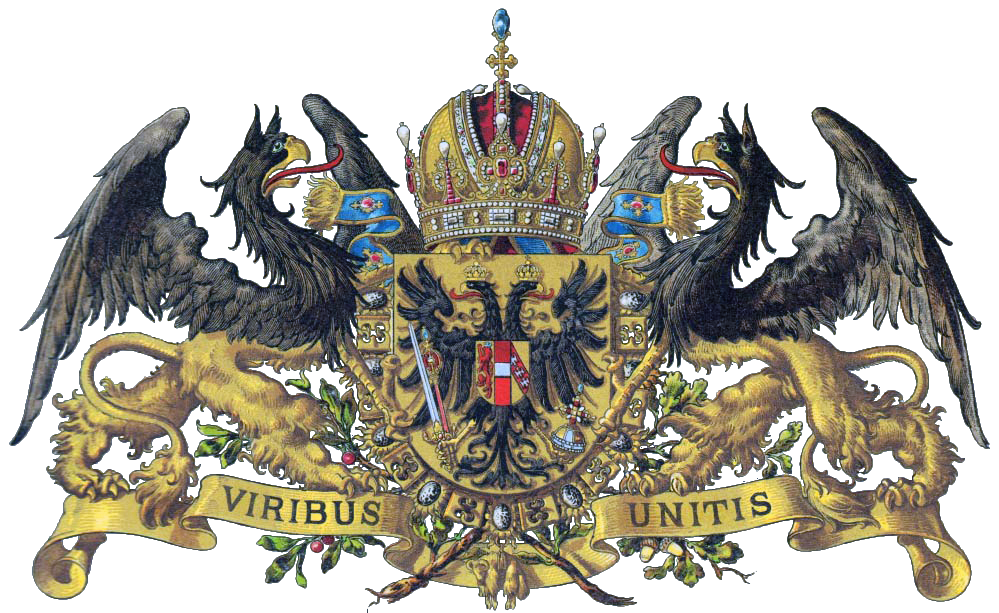 Wappen seiner kaiserlich-königlichen Majestät Franz Joseph I. von Habsburg Lothringen; Kaiser von Österreich und König von Ungarn etc. etc.